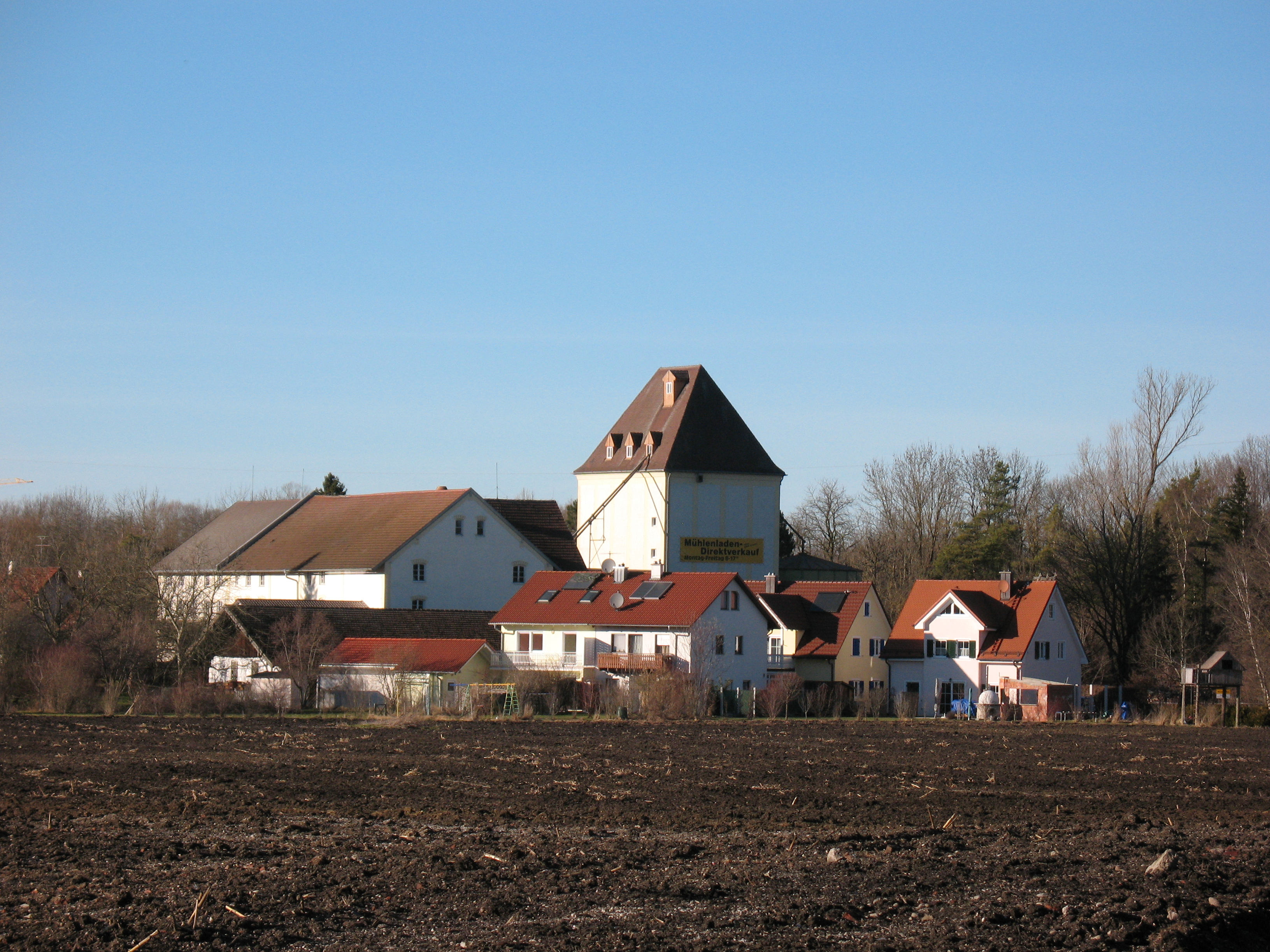 Die Würmmühle bei Dachau von der Alten Römerstraße aus aufgenommen.